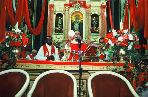 Dentro da Igreja MAtriz de Nossa Senhora do Ó, enquanto era celebrada a Festa do Divino, conduzida atualmente pelo Padre Dalton Caran.